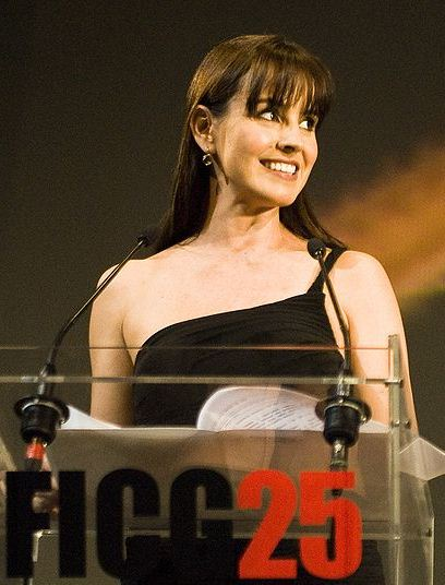 Alejandra Barros en la entrega del Premio Guadalajara a Rodrigo García, director de la película "Mother & Child", en el marco de las actividades del Festival Internacional de Cine de Guadalajara en su edición 25. 17 de Marzo, 2010. Guadalajara, México. © Cortesía FICG25 / Gonzalo García Ramírez.